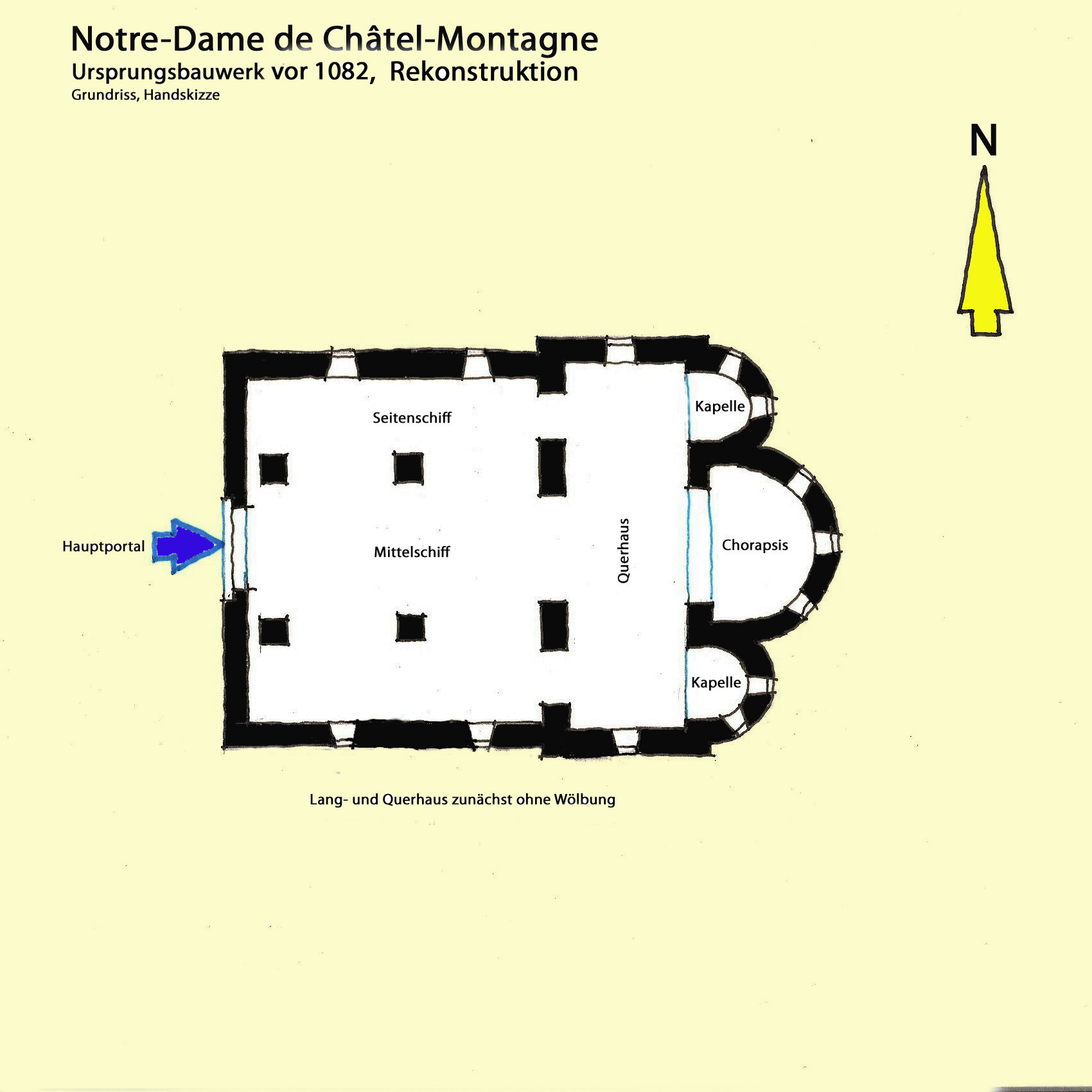 N.-D._de_Châtel-Montagne,_Ursprungs-_bauwerk, Grundriss, Handskizze